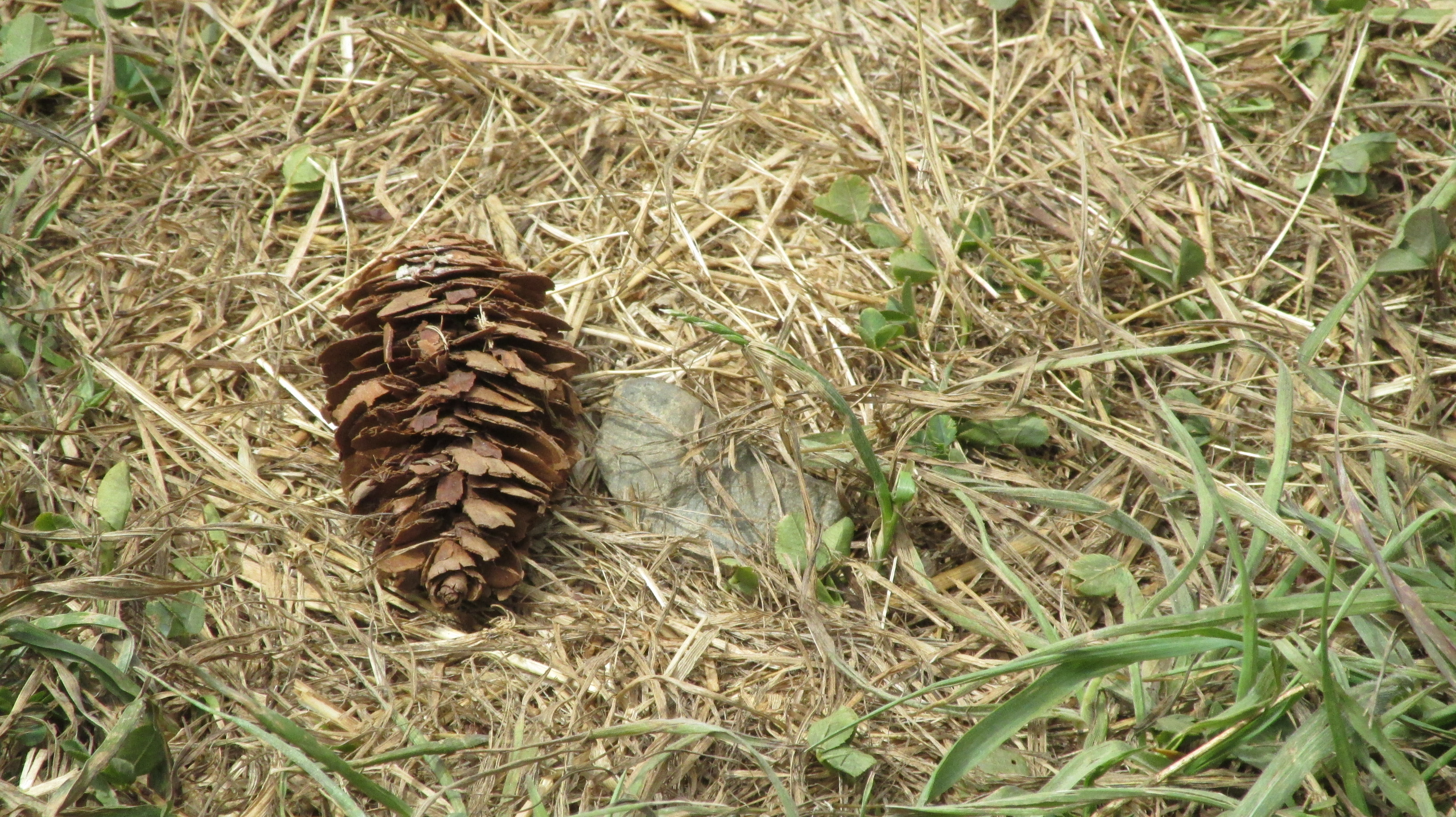 Reserva nacional Valdivia